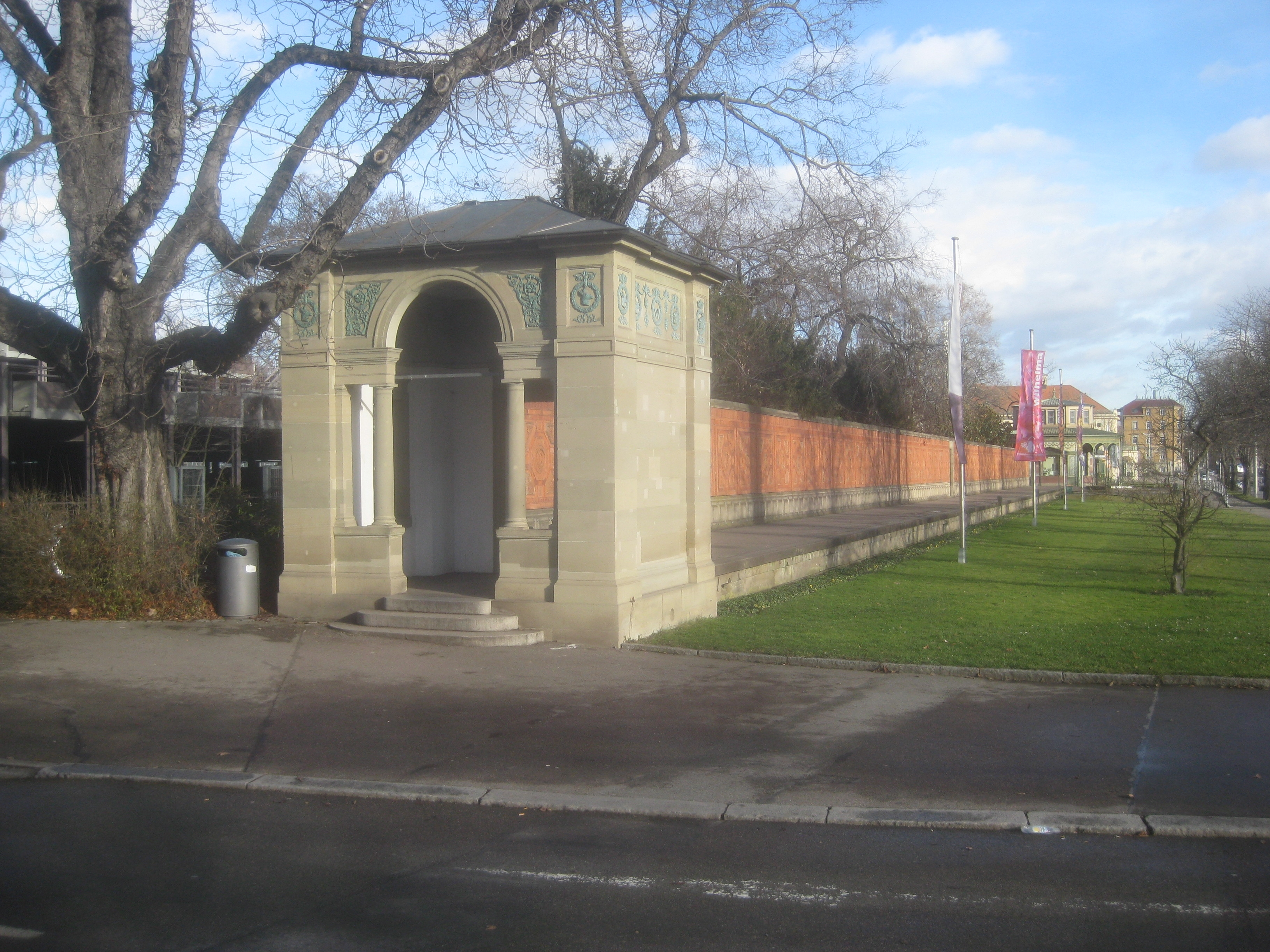 Bellevue-Tor von 1837 am Anfang des Wandelgangs mit der Terrakottawand (Wilhelma) der Wilhelma in Stuttgart. Bellevue war ein königliches Landhaus, das an der Stelle des heutigen Wilhelma-Parkhauses stand.